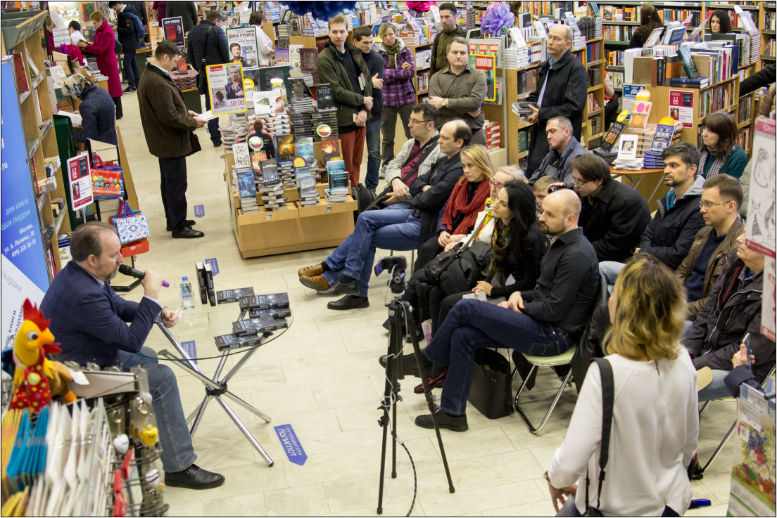 Презентация романа "Балканский рубеж" и встреча Ивана Наумова с читателями 12 апреля 2019 года в доме книги Молодая гвардия (Москва)